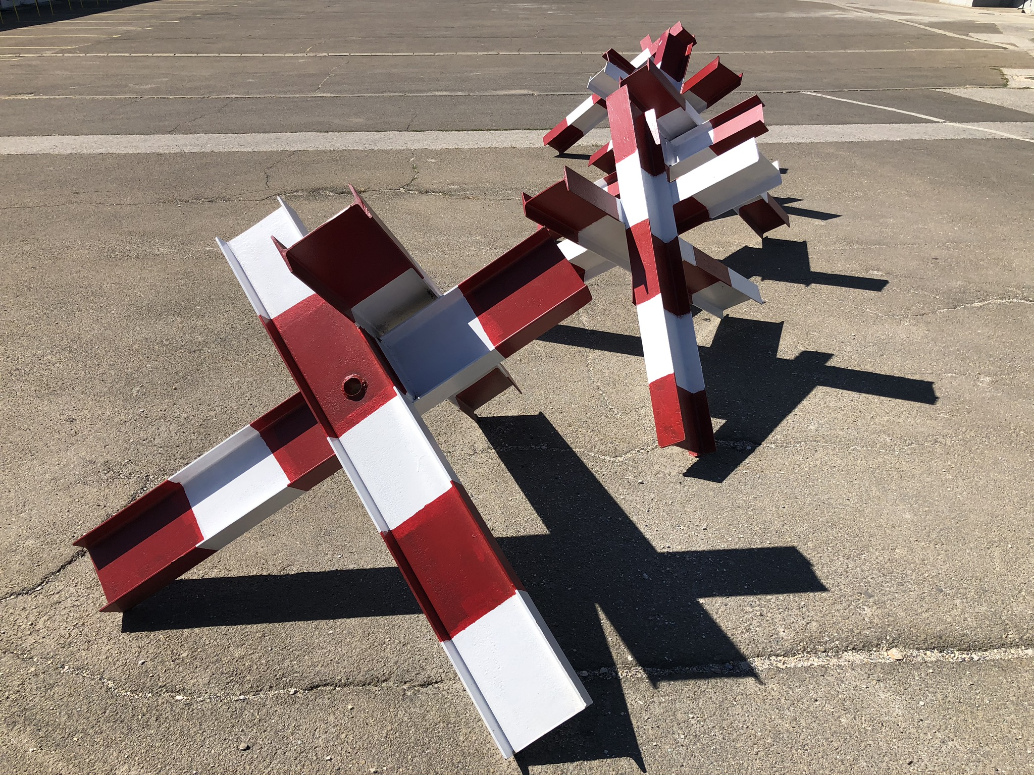 Cavallo di frisia della base MSU Carabinieri in Pristina (Kosovo)